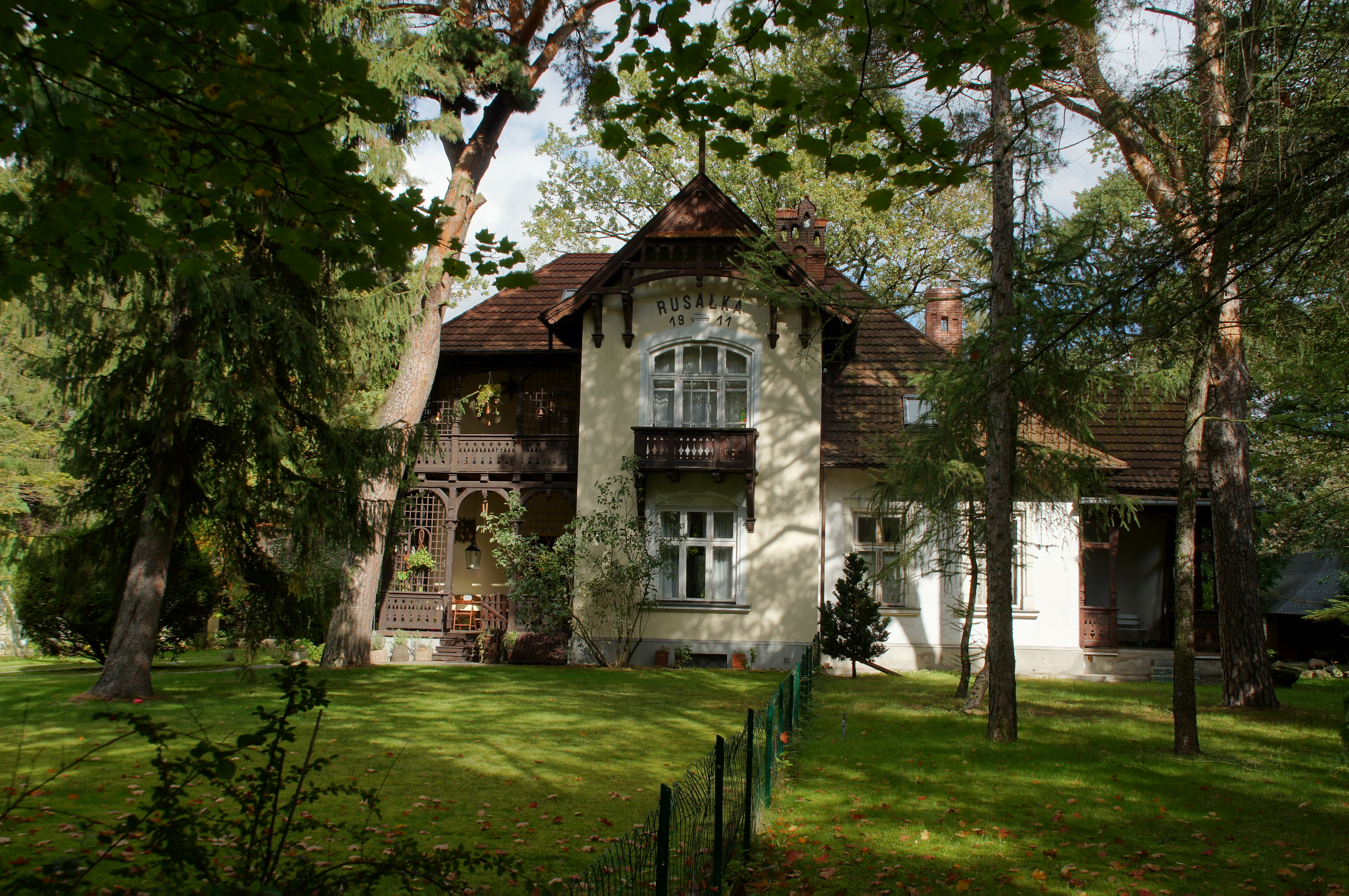 Konstancin-Jeziorna, zespół willi RUSAŁKA, 1909-1911